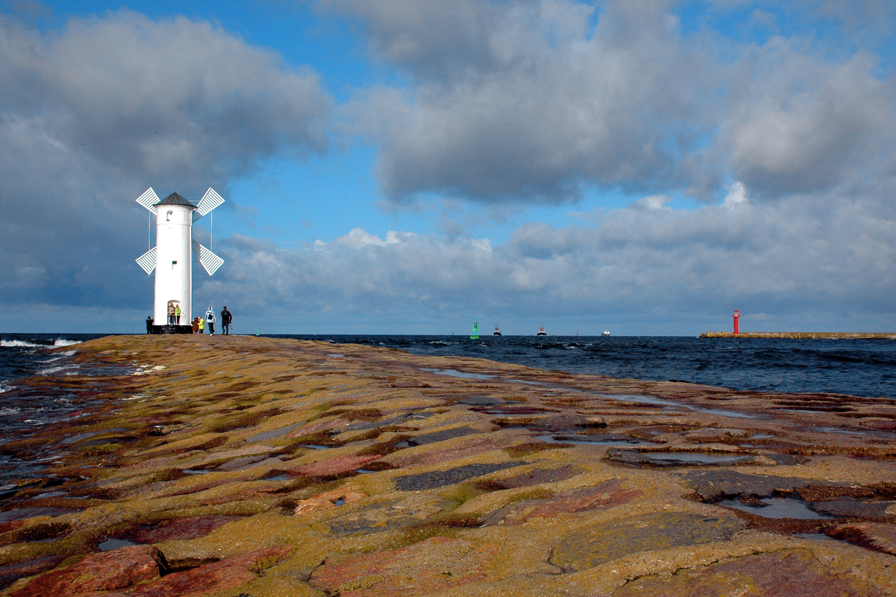 Stawa "Młyny" na falochronie zachodnim w Świnoujściu